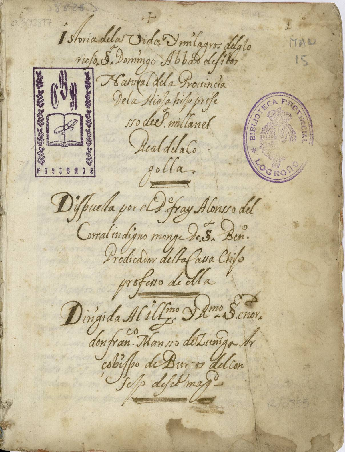 Portada manuscrita del libro titulado historia y vida de Santo domingo de Silos natural de la provincia de La Rioja- Datado en el año año 1649.